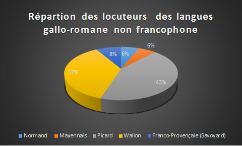 représentation graphique de donné provenant Wikipedia extraite a partir de donné textuelle